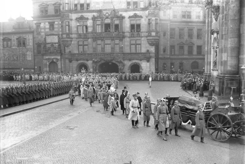 Die feierliche Beisetzung des Exkönig Friedrich August III von Sachsen in Dresden ! Eine Traditionskompagnie der Reichswehr stellte das Ehrengeleit. Hinter dem Sarge folgten die drei Söhne des Verstorbenen sowie der Exkronprinz Ruprecht von Bayern. Der feierliche Leichenzug bewegt sich durch die Strassen Dresdens zur Hofkirche. Links eine Ehrenkompagnie der Reichswehr.